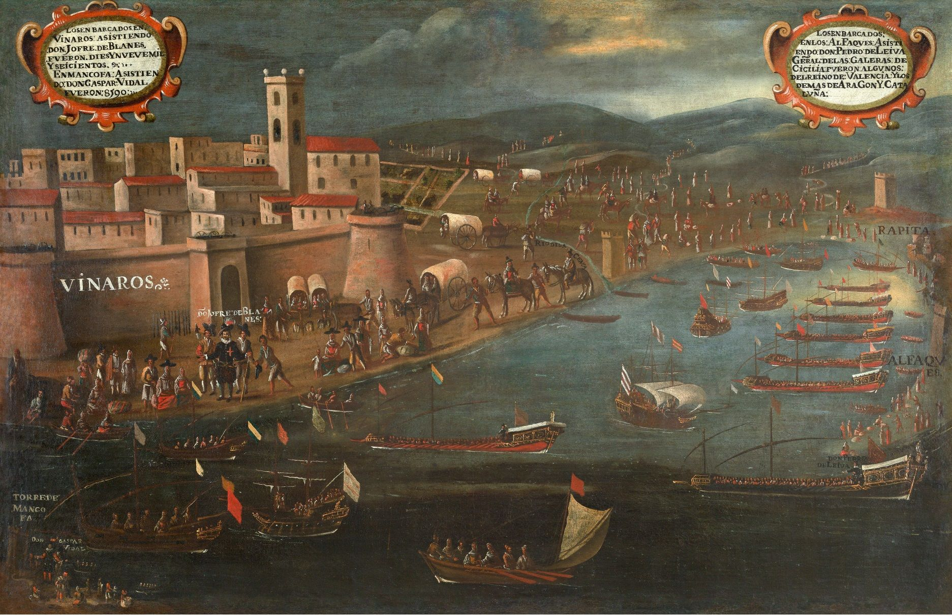 L'Expulsió al Port de Vinaros. La expulsión en Vinaroz. Obra de Pere Oromig i Francisco Peralta.